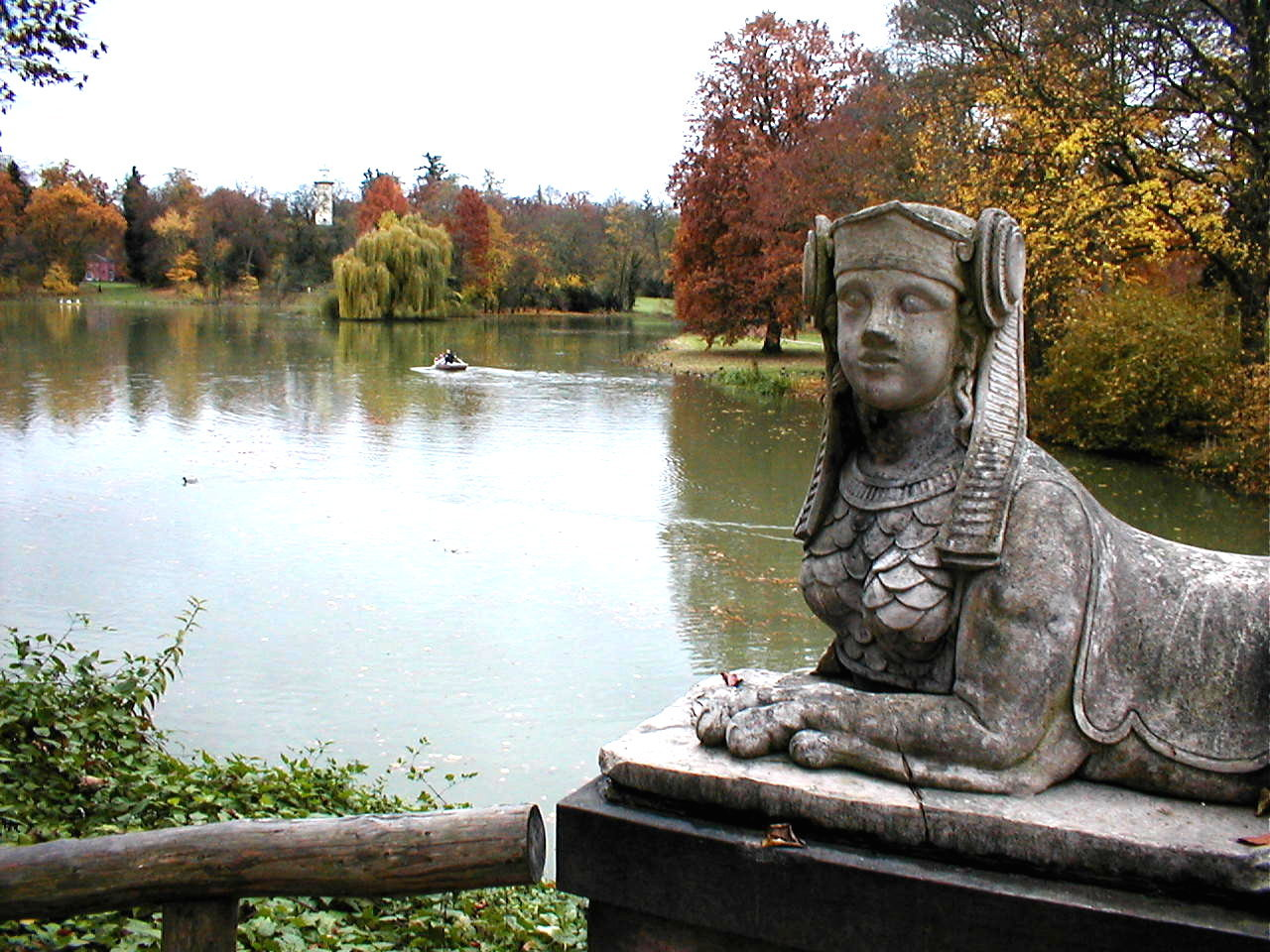 Sphinx-Statue auf der "Roten Brücke" im Park Schönbusch bei Aschaffenburg Sphinx statue on the "Red Bridge" in Park Schönbusch at Aschaffenburg/Germany